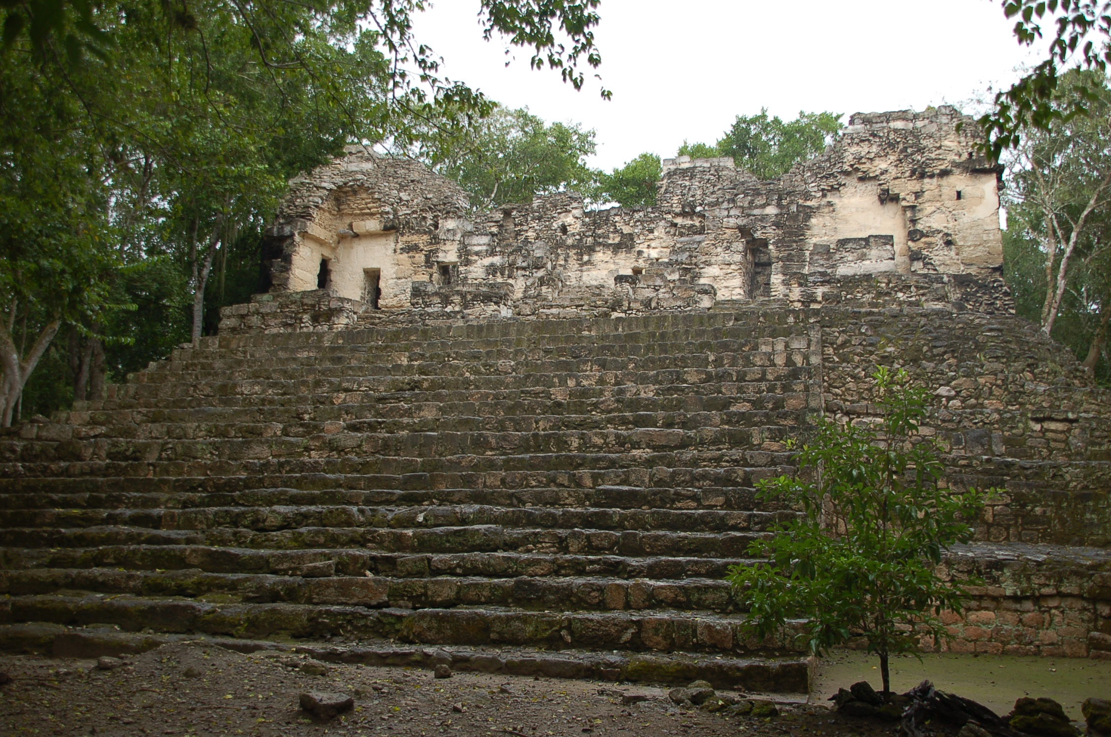 Site de Calakmúl, Campeche, Yucatán, Mexique